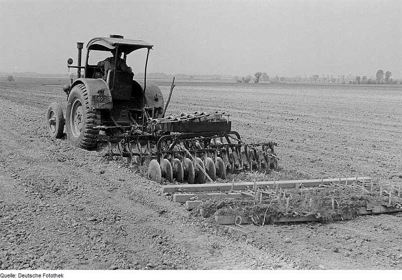 Original image description from the Deutsche Fotothek Bauer mit Traktor beim Pflügen eines Felds